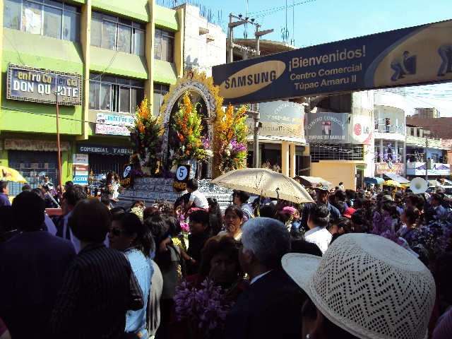 Procesión Señor de los Milagros en Tacna